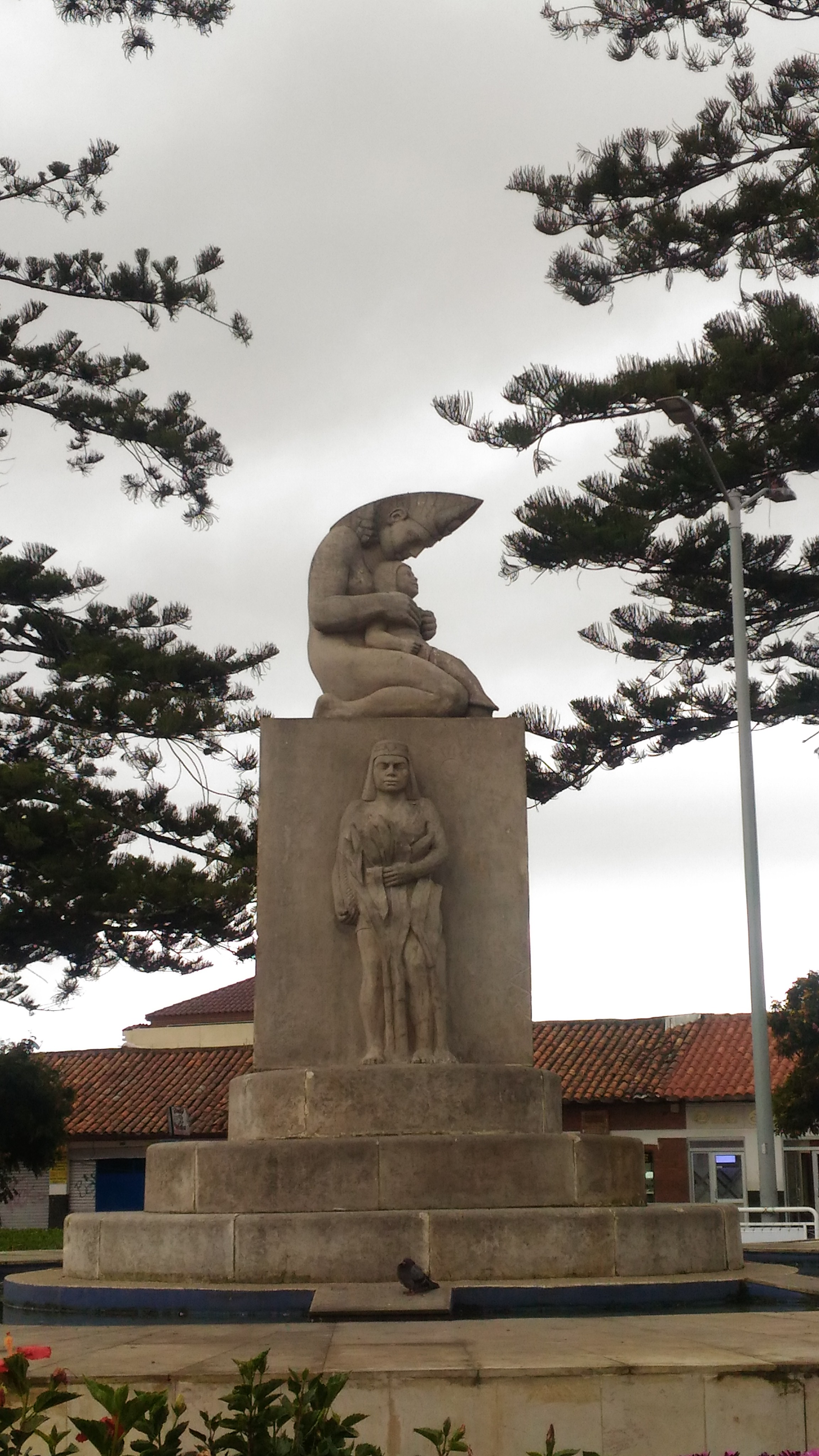 Estatua da deusa Chía, en Chía.